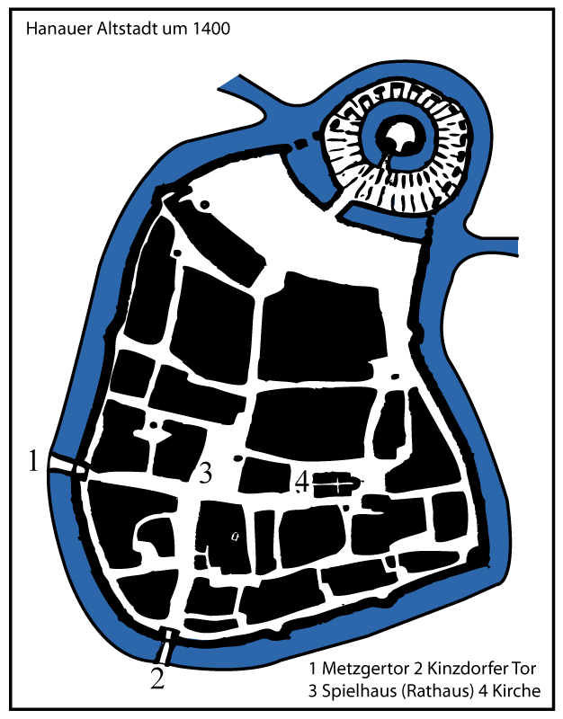 Skizzenkarte der Hanauer Altstadt um 1400